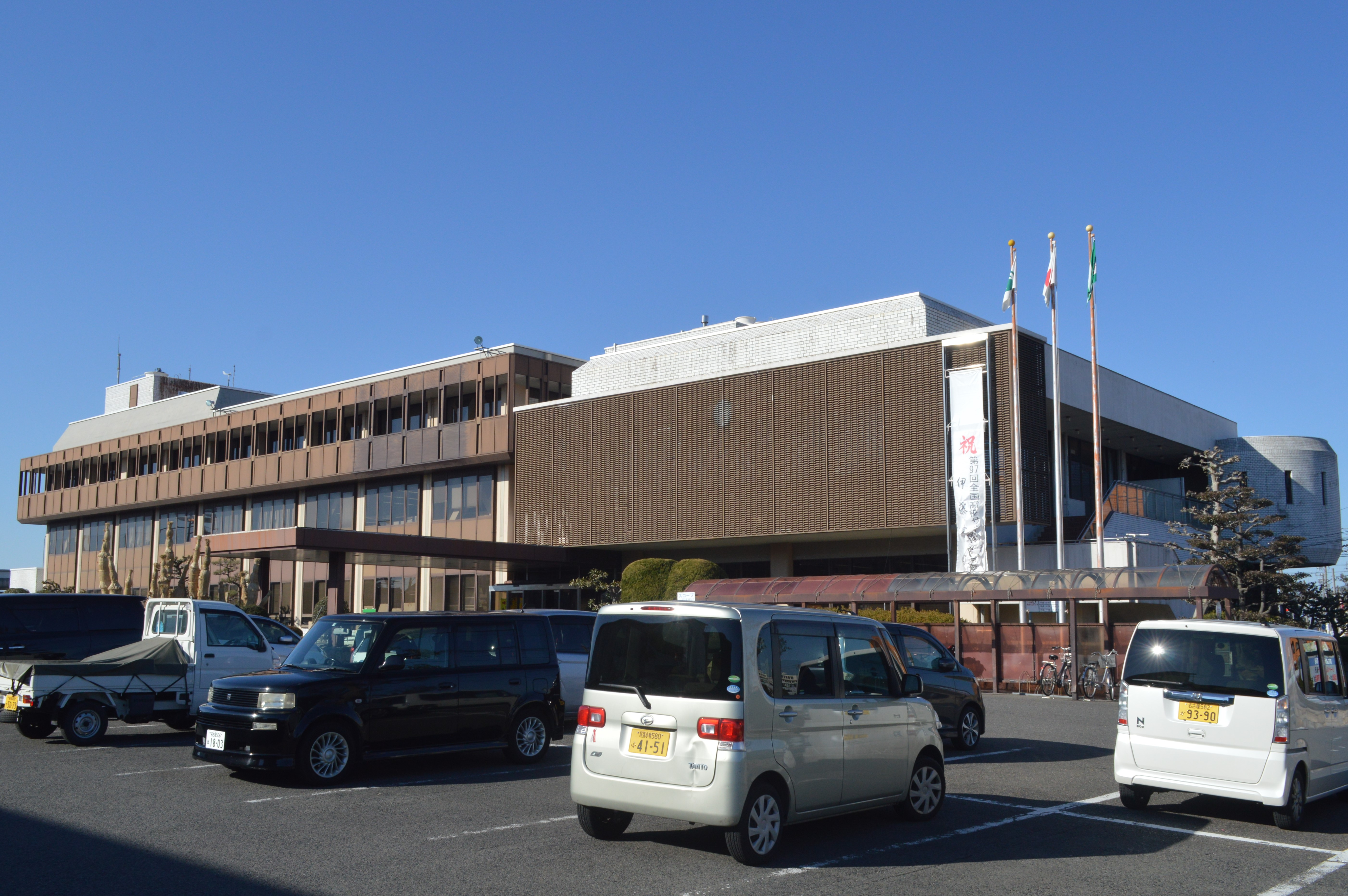 愛知県あま市にあるあま市役所甚目寺庁舎。旧甚目寺町役場。